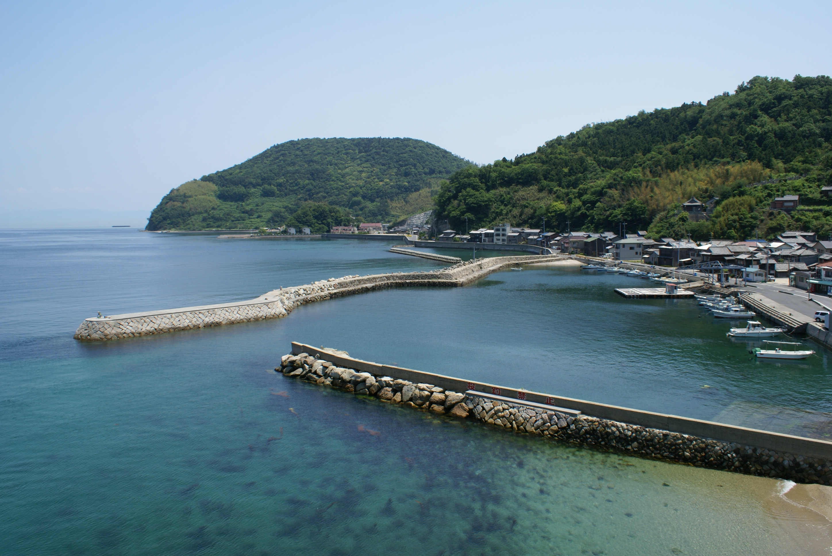 Okikamurojima, Yamaguchi prefecture, Japan